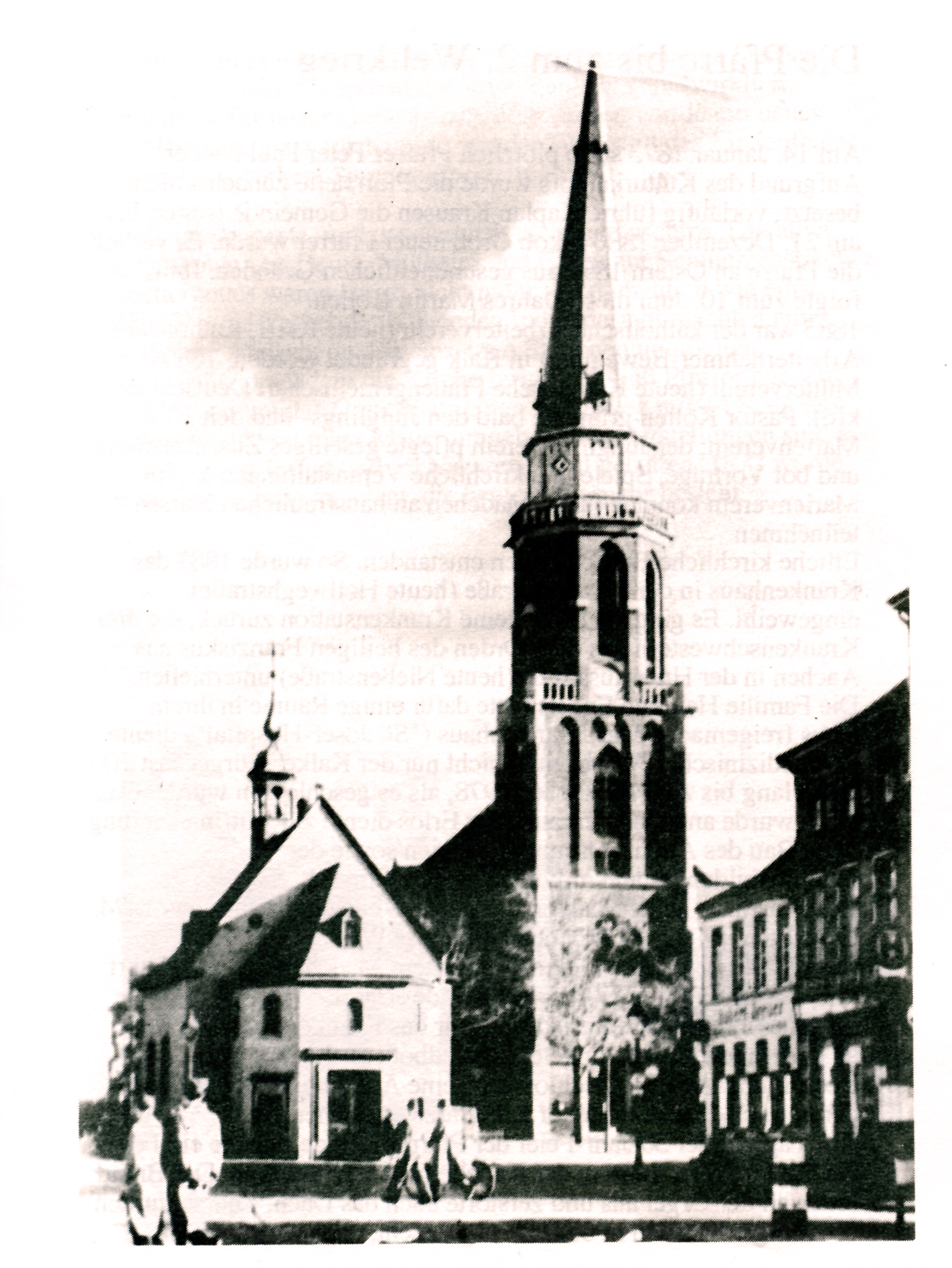 Köln, Kalker Kapelle um1902